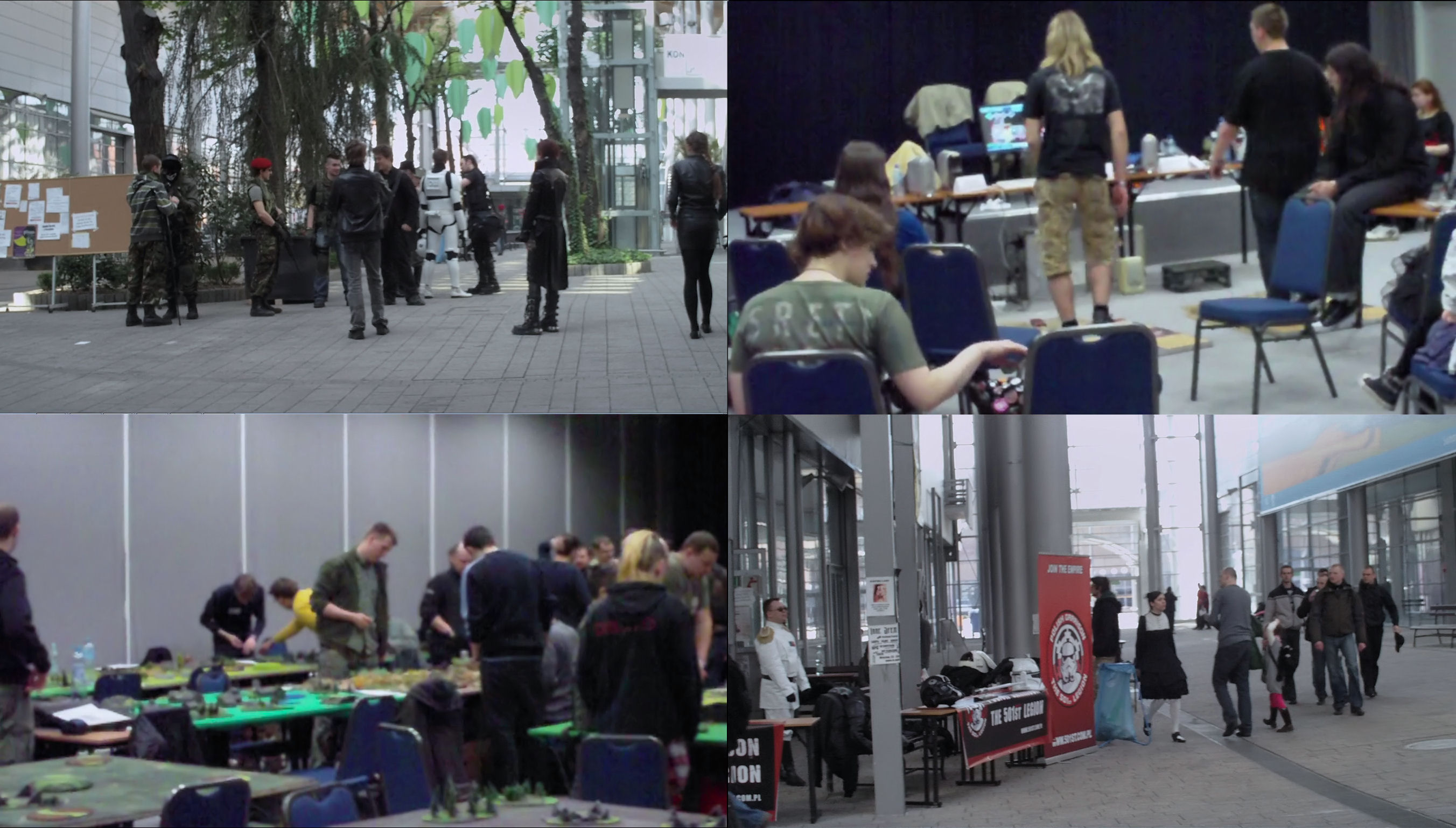 Pyrkon 2011 w Poznaniu, wybrane zdjęcia